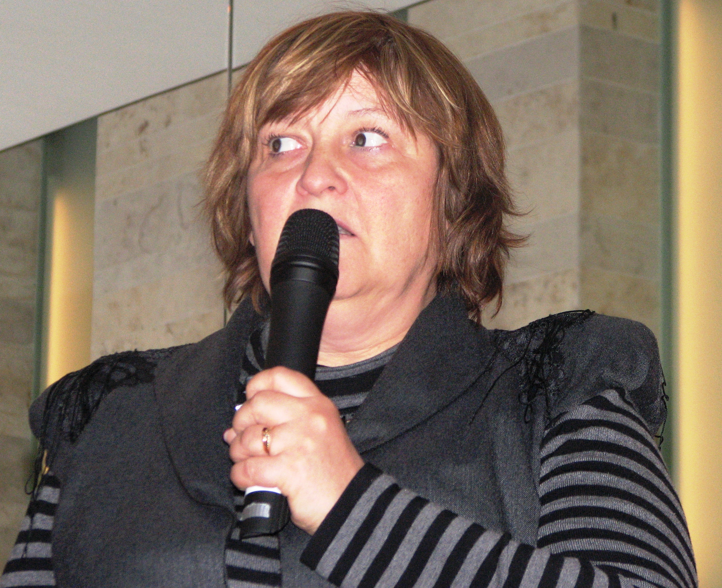 Tiina Lokk Balti Raamatumessil 2010.